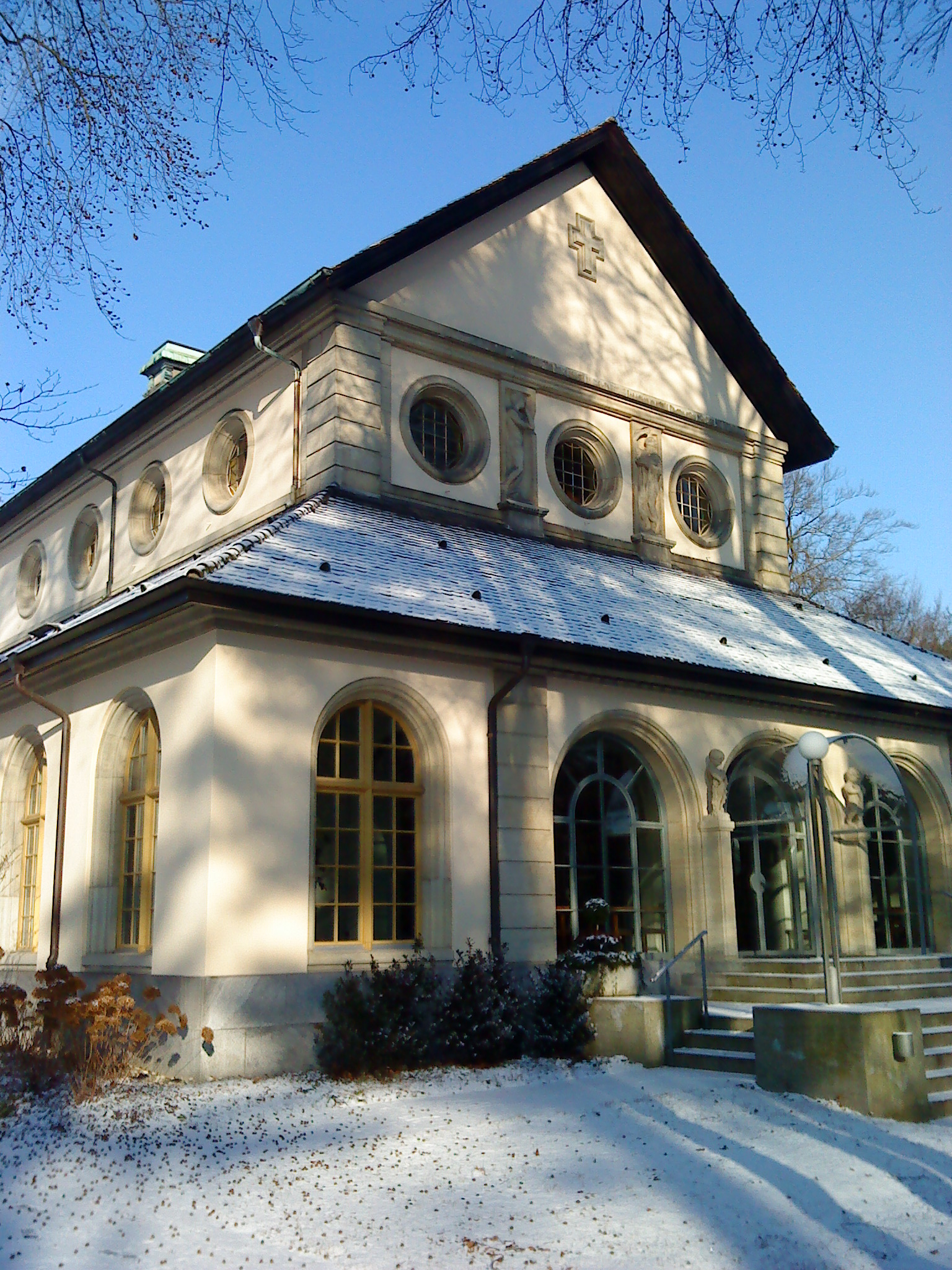 Fassade der Abdankungshalle im Waldfriedhof Schaffhausen